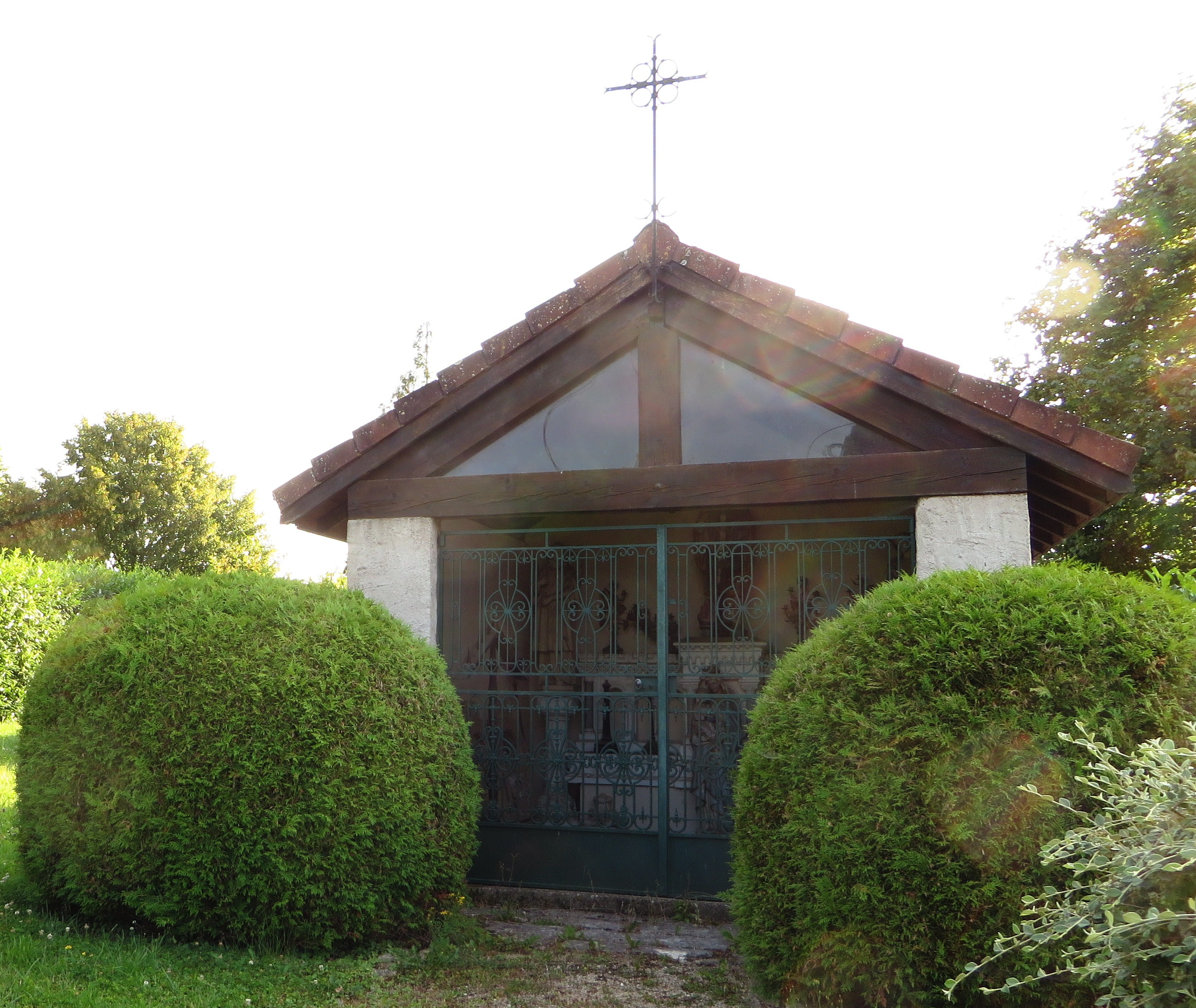 Épinonville Chapelle Saint-Nicolas d'Ivoiry